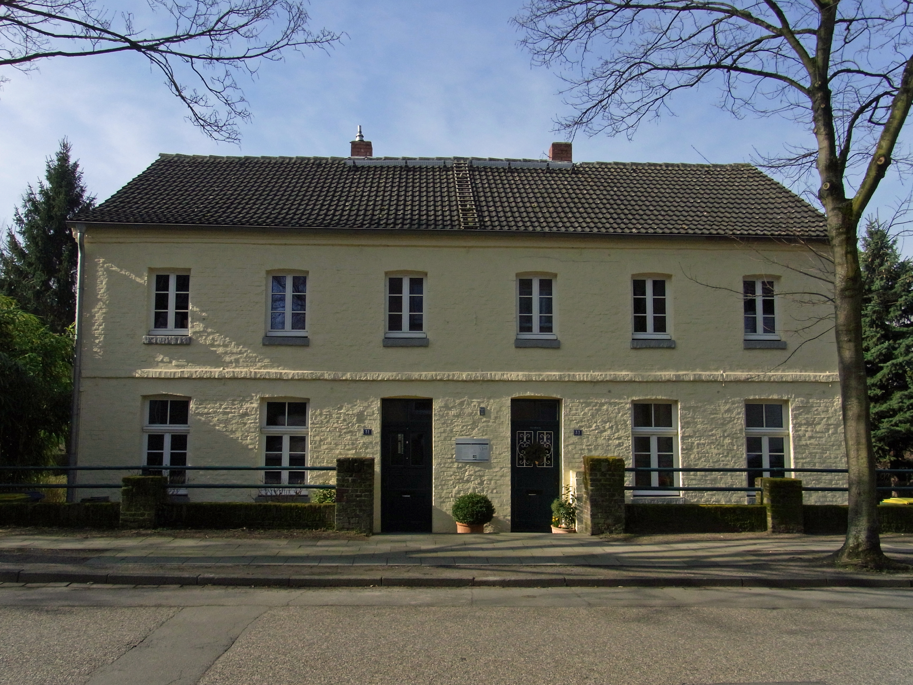 Siedlung Eisenheim